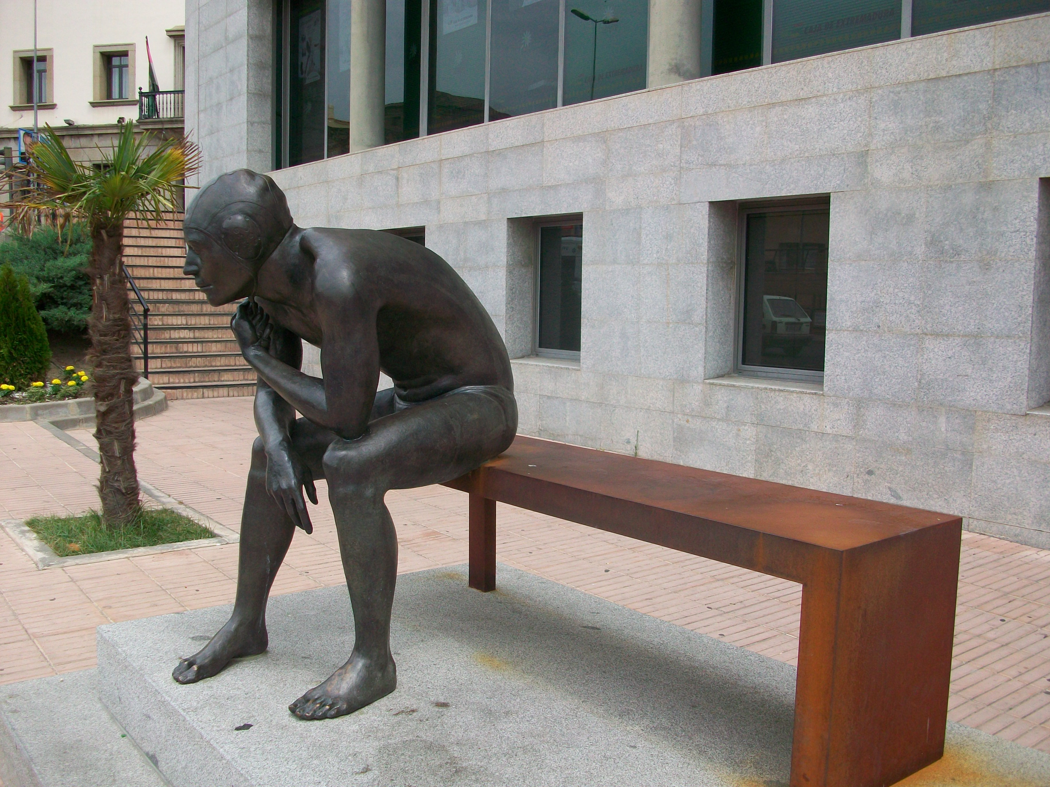 Escultura llamada "El entrenamiento" en Plasencia, Cáceres.